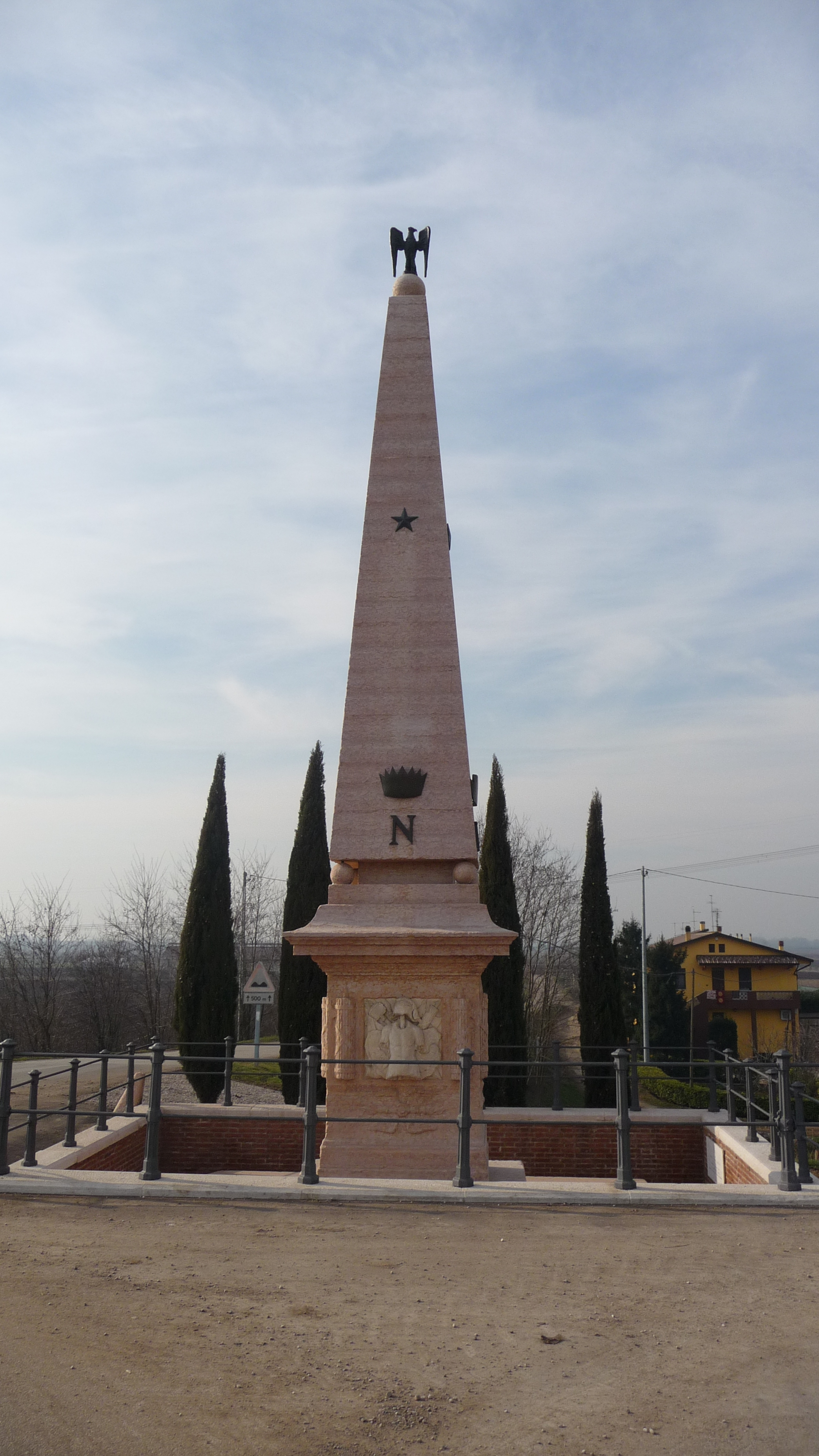 Obelisco costruito a testimonianza della vittoria delle truppe francesi di Napoleone Bonaparte sulle truppe austriache, al termine della famosa battaglia del ponte di Arcole.